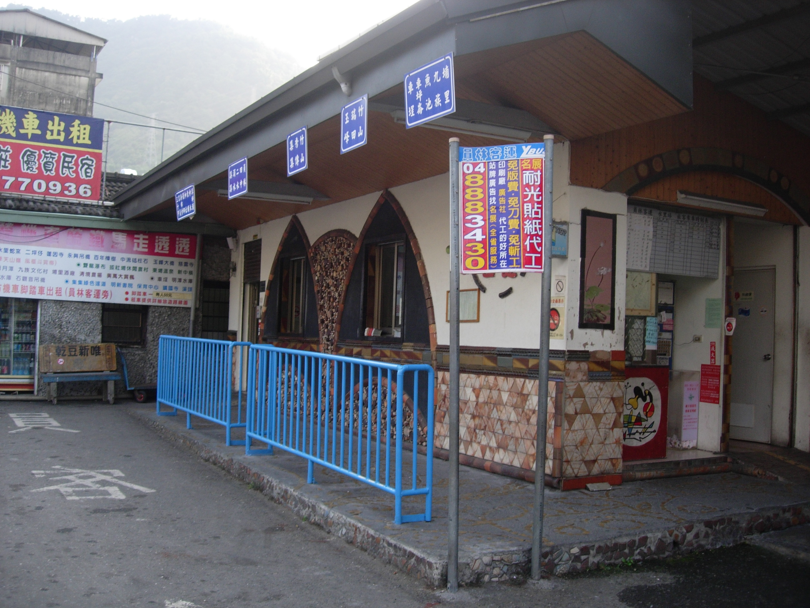 中文（台灣）: 員林客運水里站月臺